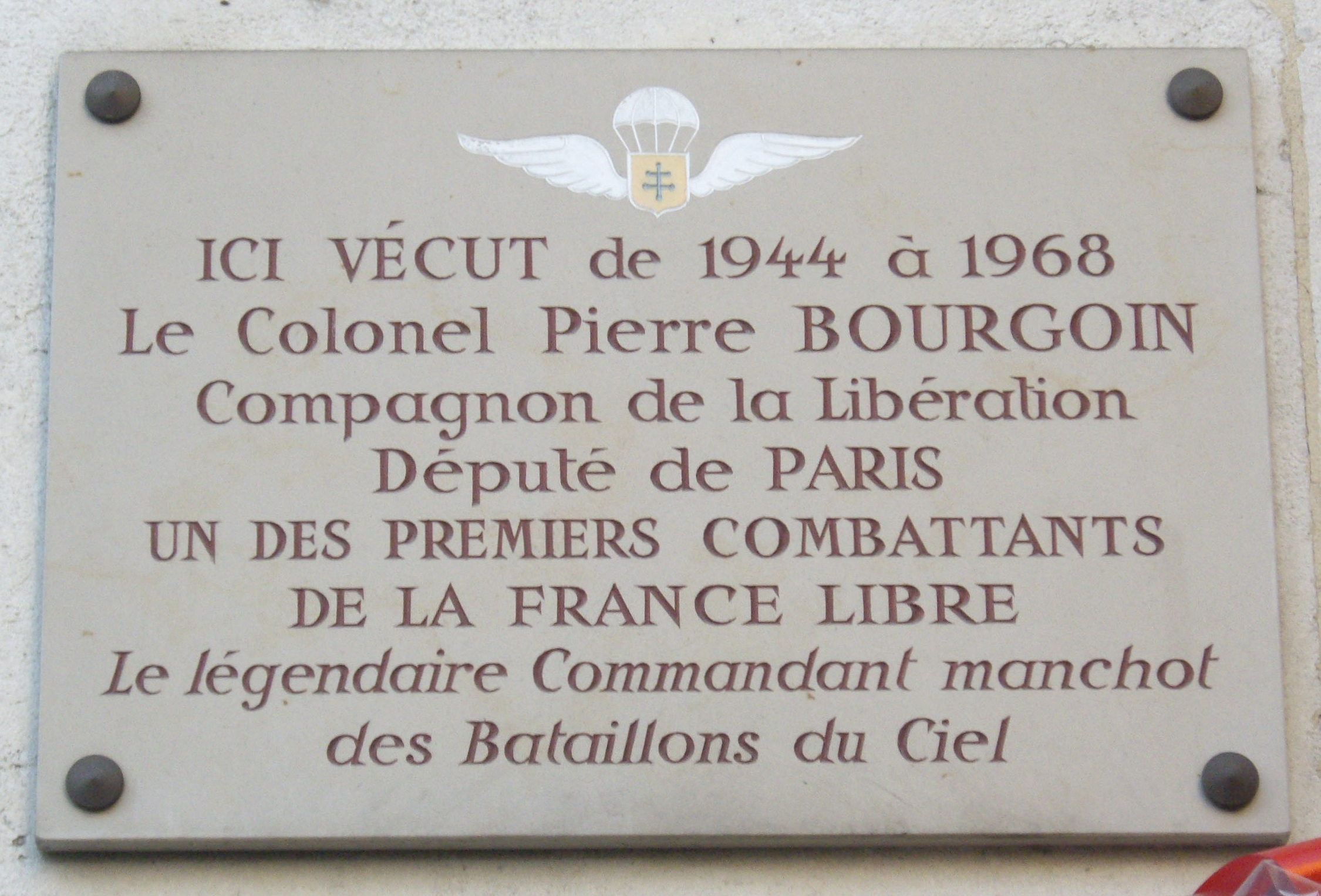 Plaque commémorative, 78 avenue Mozart, Paris 16e.« Ici vécut de 1944 à 1968 le colonel Pierre Bourgoin, Compagnon de la Libération, député de Paris, un des premiers combattants de la France libre, le légendaire commandant manchot des bataillons du ciel. »